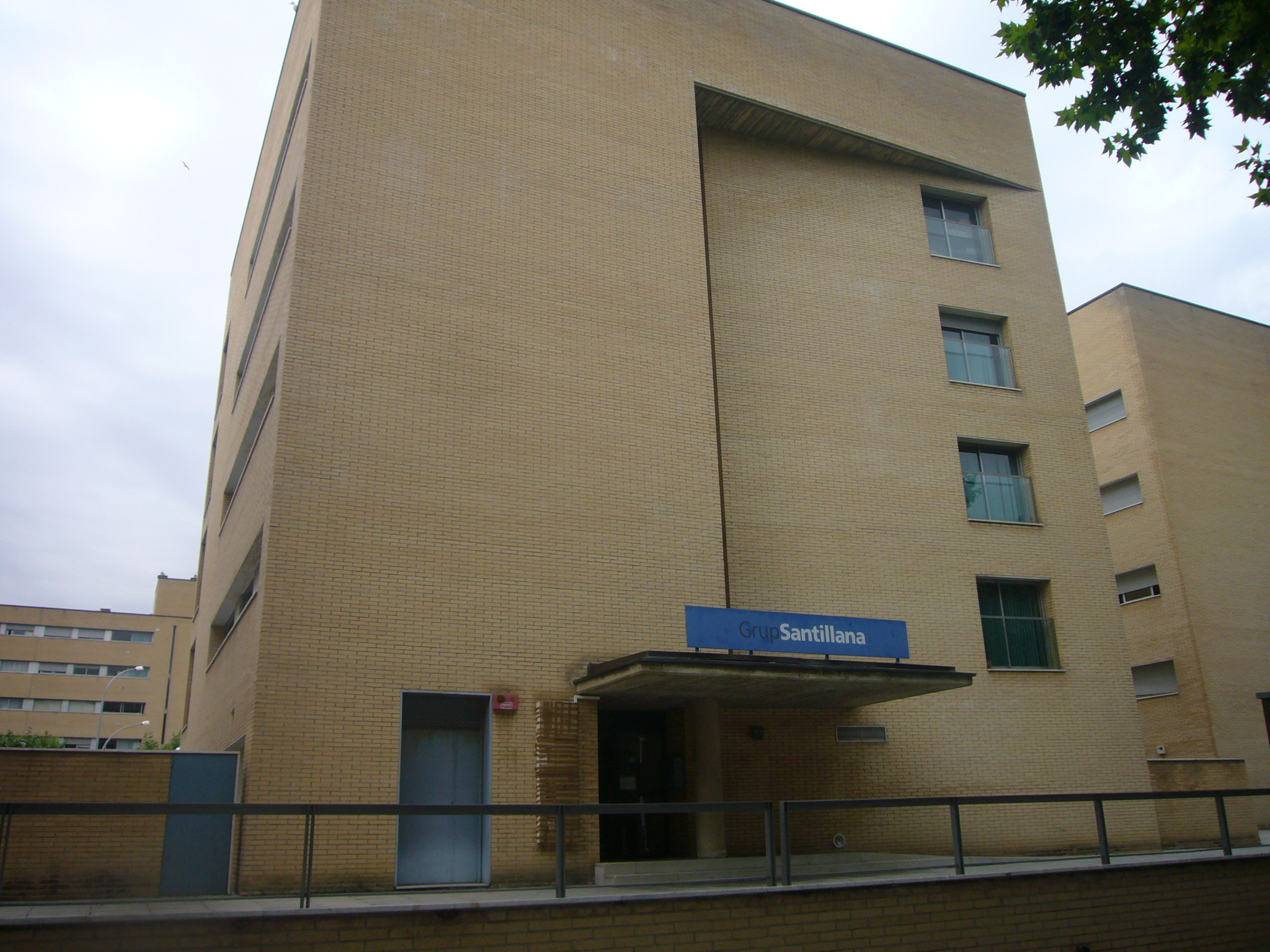 Edifici Grup Santillana - C/ Frederic Mompou, 11 (Vila Olímpica)